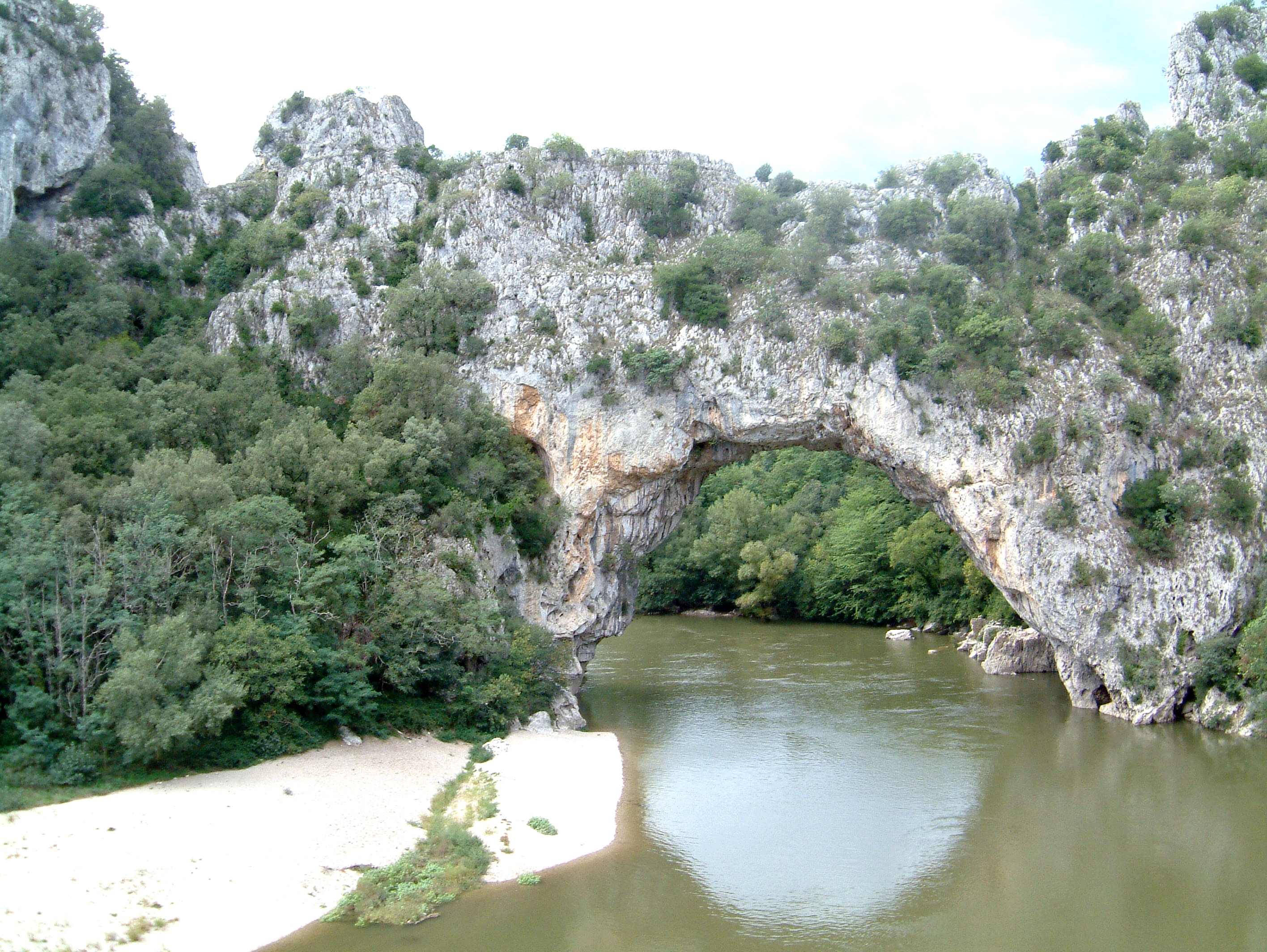 Pont-d'Arc bei Vallon-Pont-d'Arc (Rhône-Alpes)